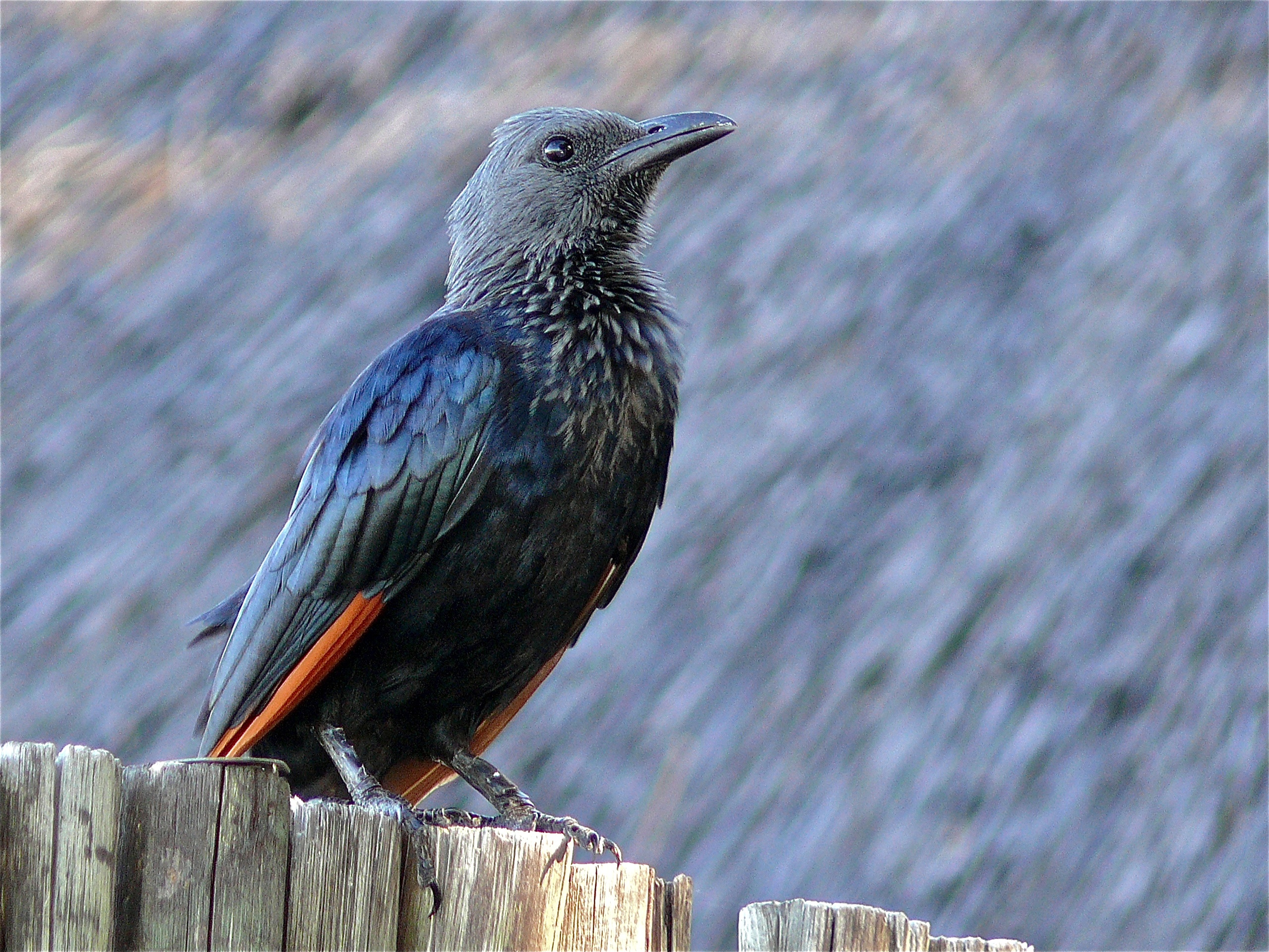 Letaba Camp, Kruger NP, SOUTH AFRICA